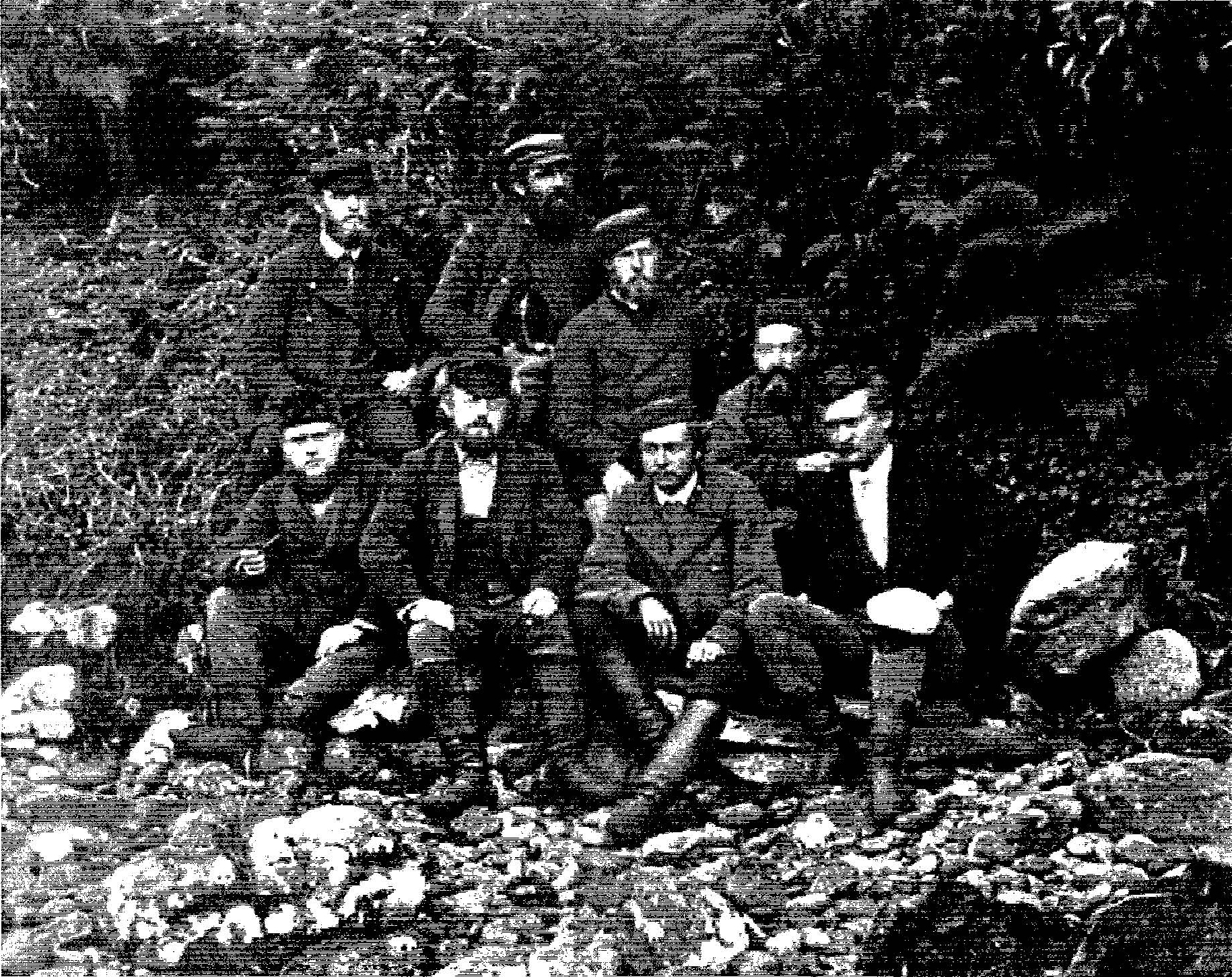 Terror Cove, Port Ross,[1] Mitglieder der deutschen Expedition III zur Beobachtung des Venusdurchgangs 1874. Von links nach rechts. Vorne: Hugo von Seeliger, Wilhelm Schur, Johannes Krone, Hermann Leyser. Hinten: Guido Wolfram, Siegel, W. J. Becks, Hermann Krone.